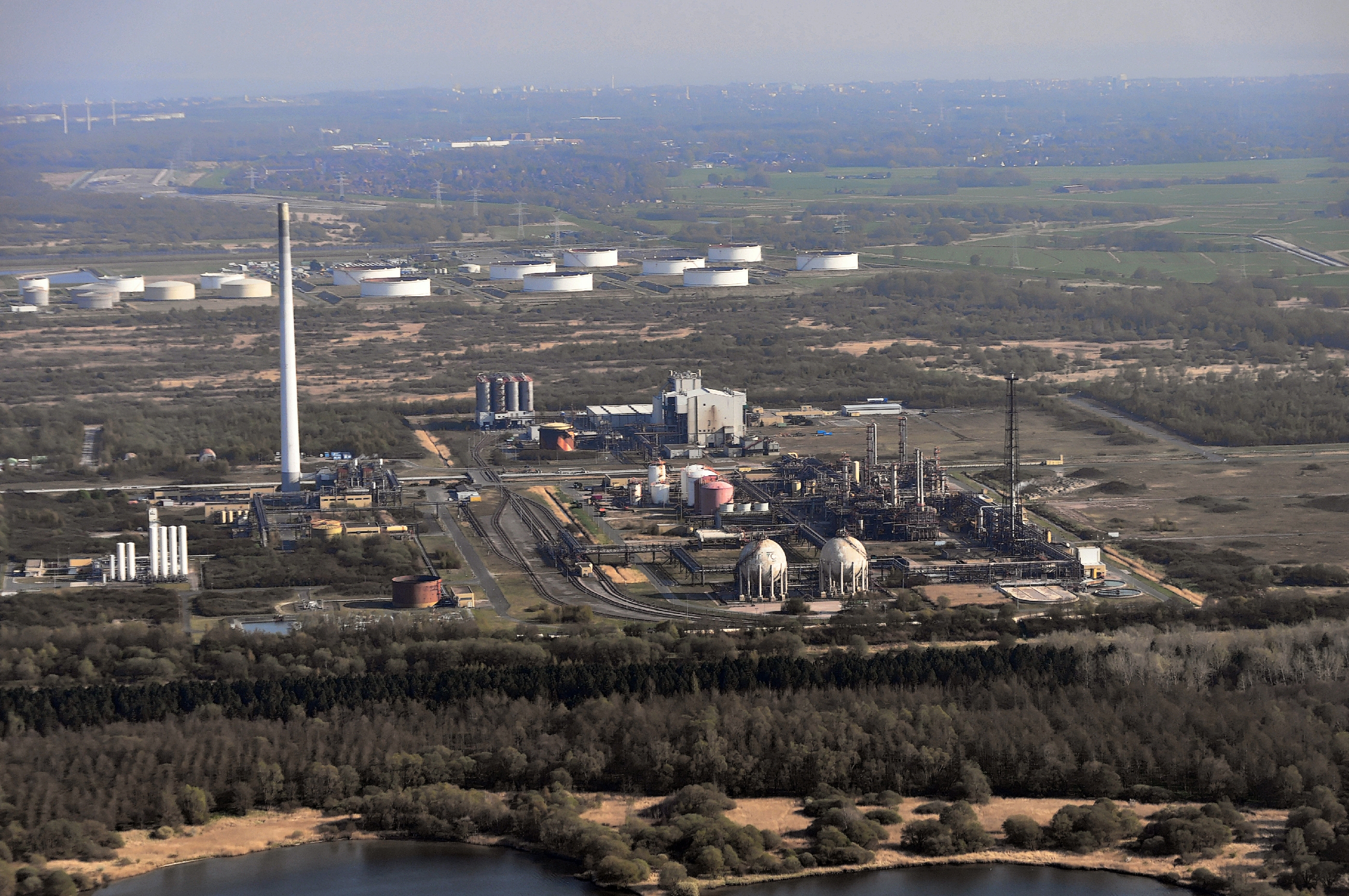 Luftbilder von der Nordseeküste 2013-05